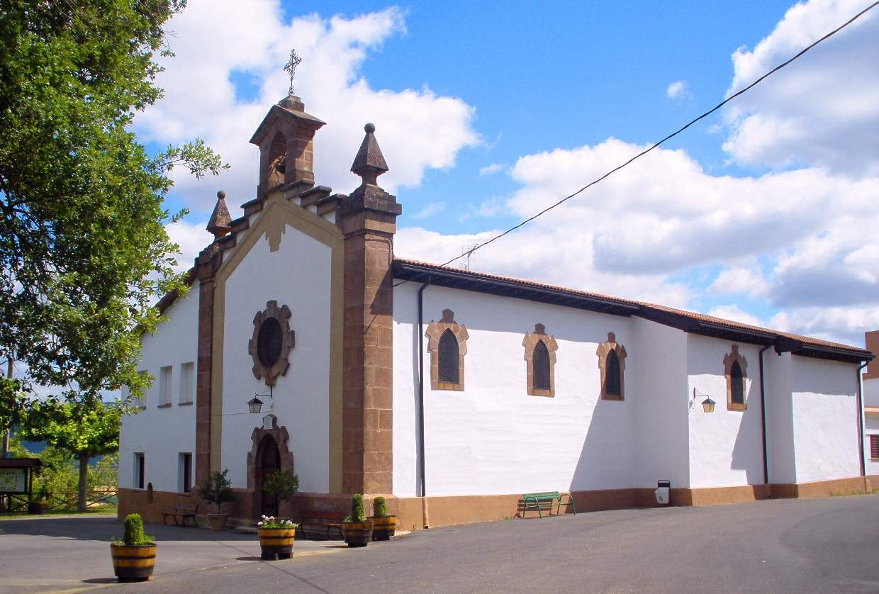 Santa Cruz de Campezo (Álava) - Ermita de Nuestra Señora de Ibernalo